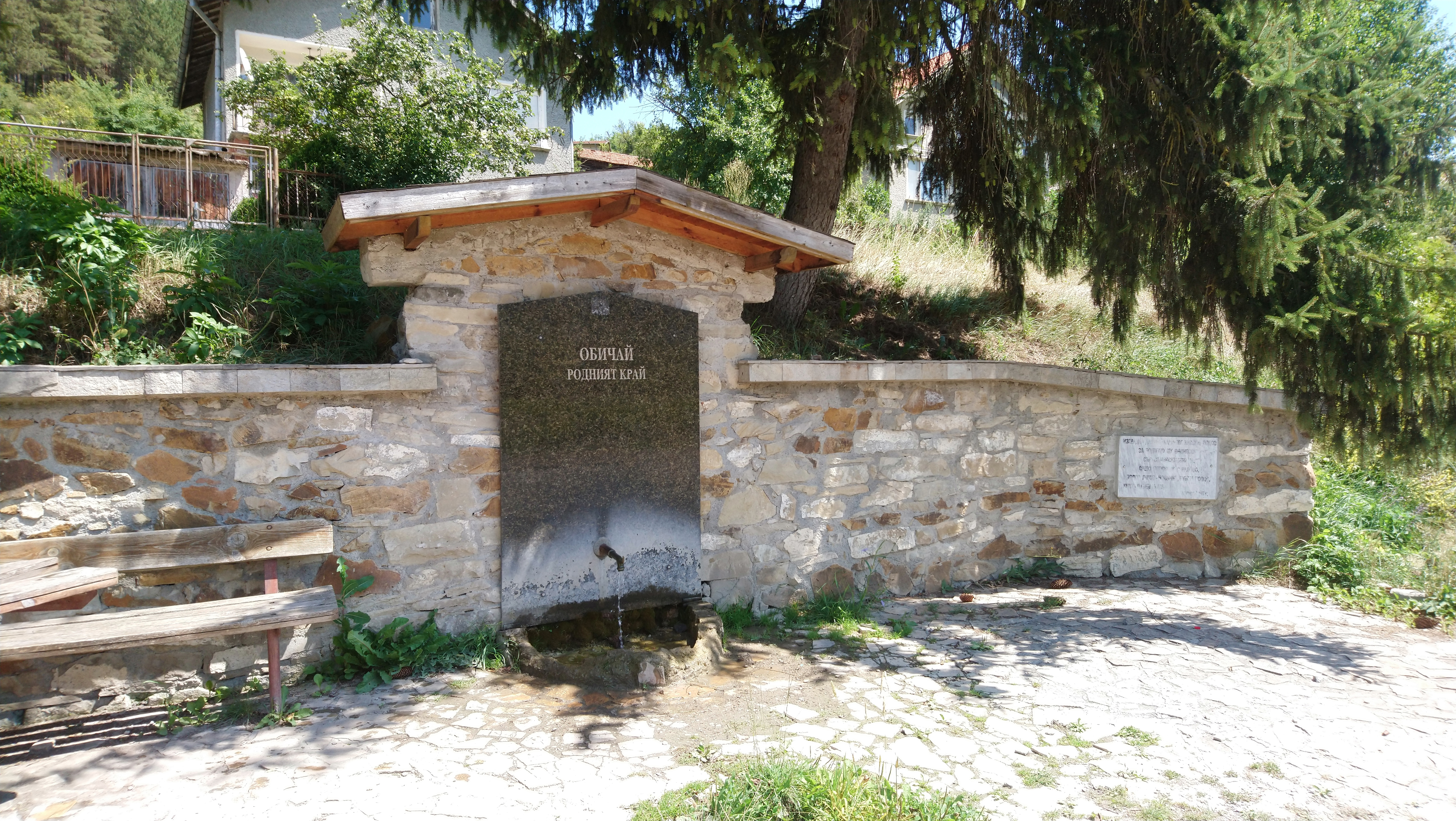 Чешмата в село Филиповци, област Перник, изградена от академик Никола Попов